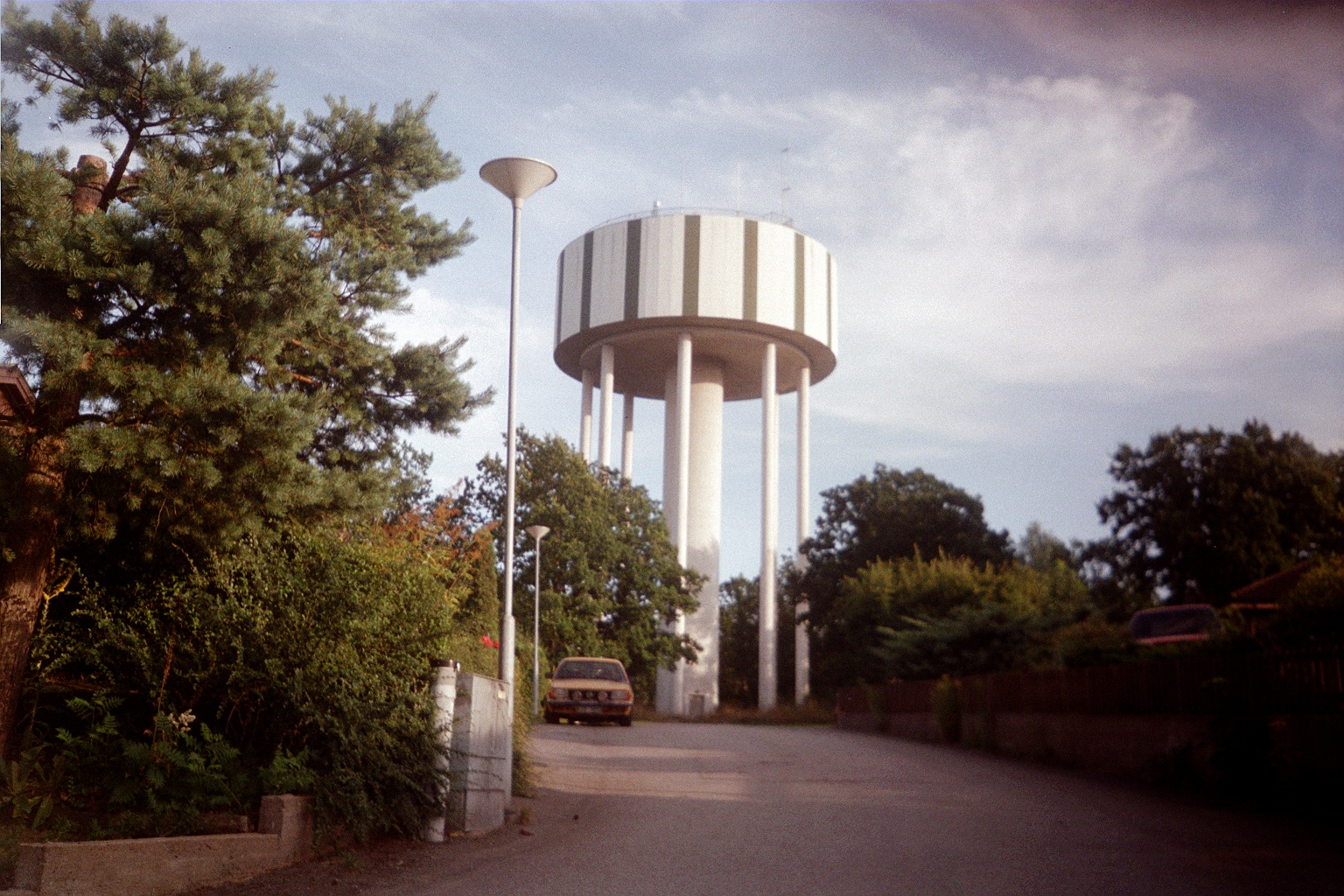 Vattentornet i Jämjö, Karlskrona kommun, Blekinge. Fotograf: Ärkan